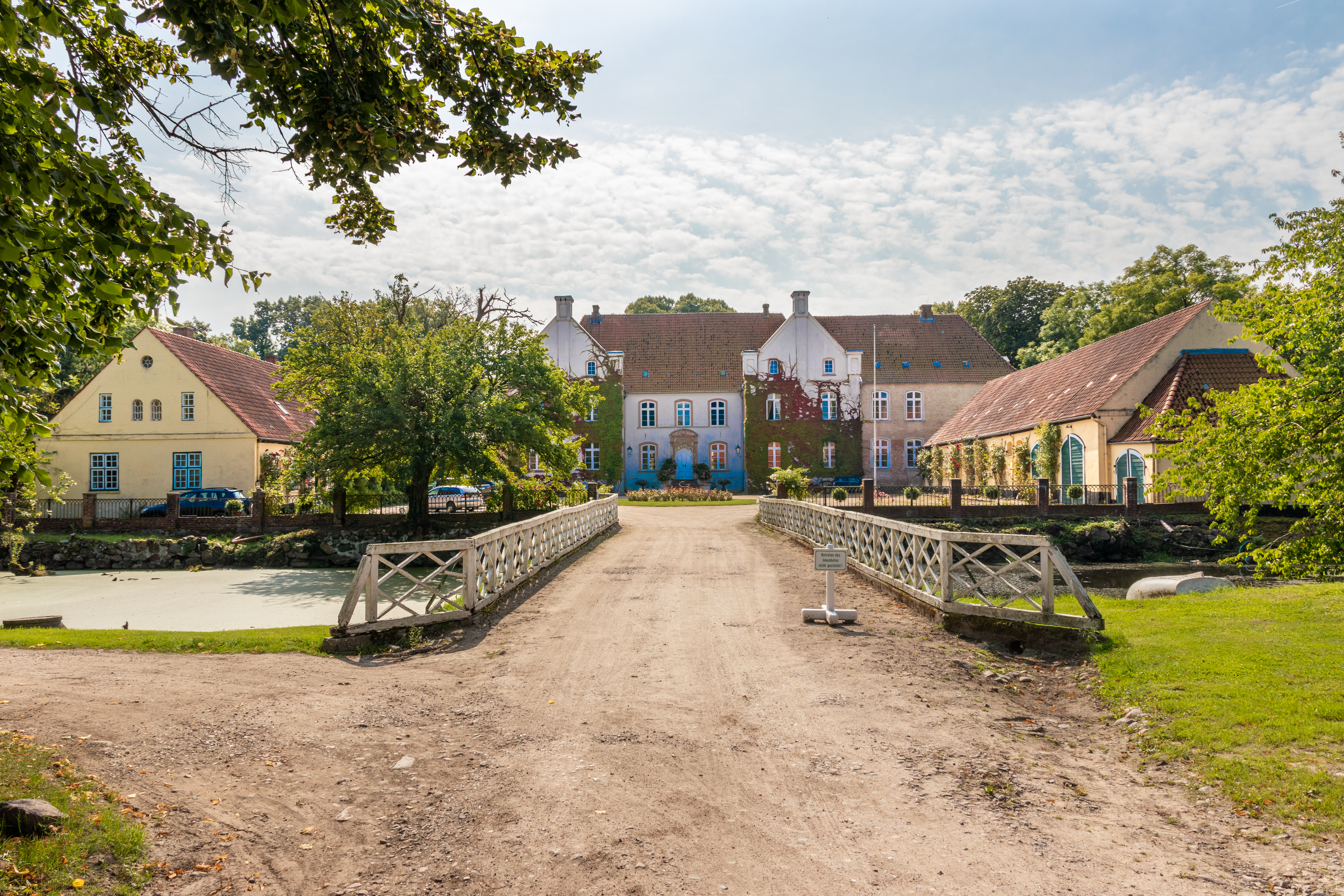 Gut Damp – Haupthaus